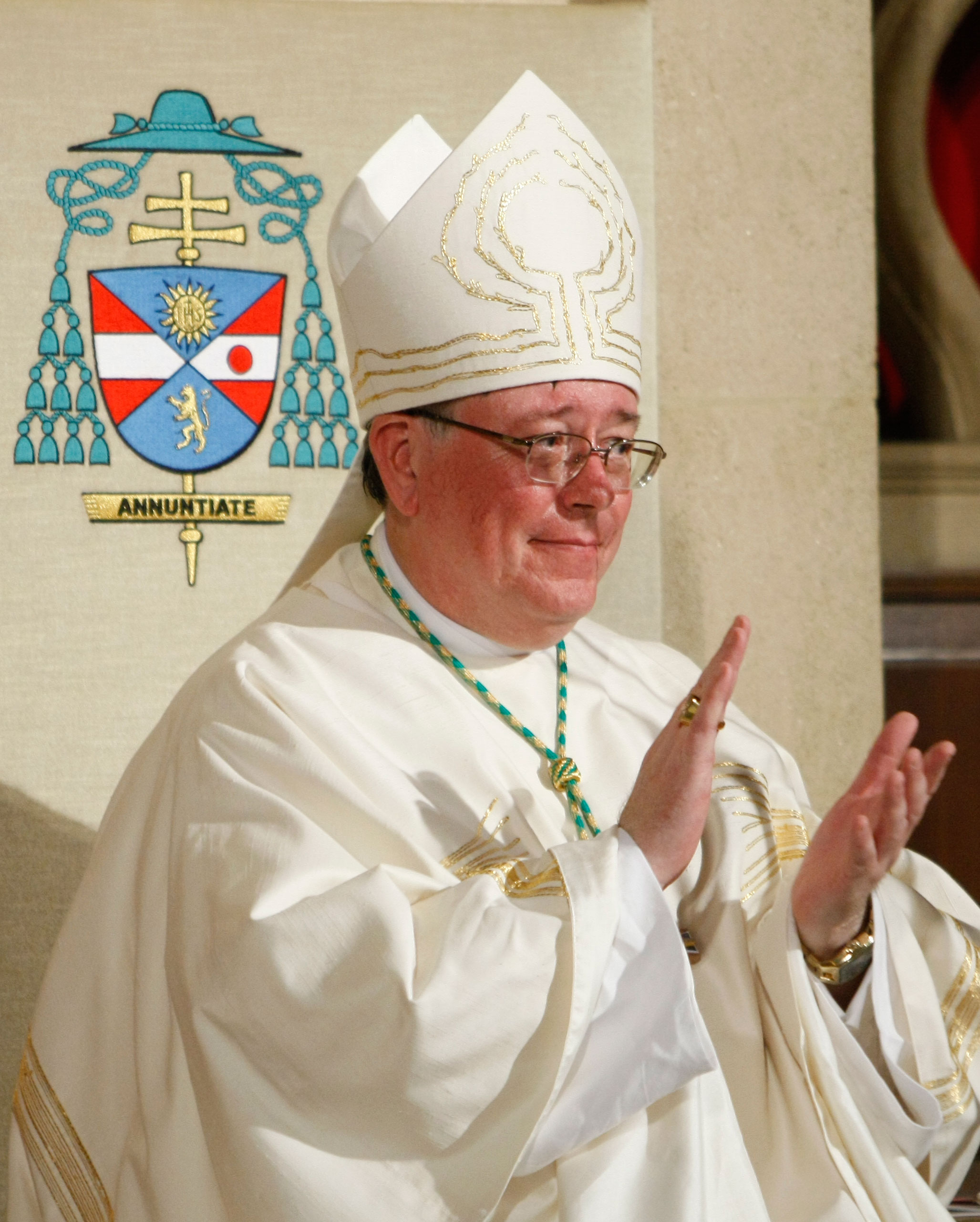 Le père-évêque Jean-Claude Hollerich SJ le jour de son ordination épiscopale à la cathédrale de Luxembourg